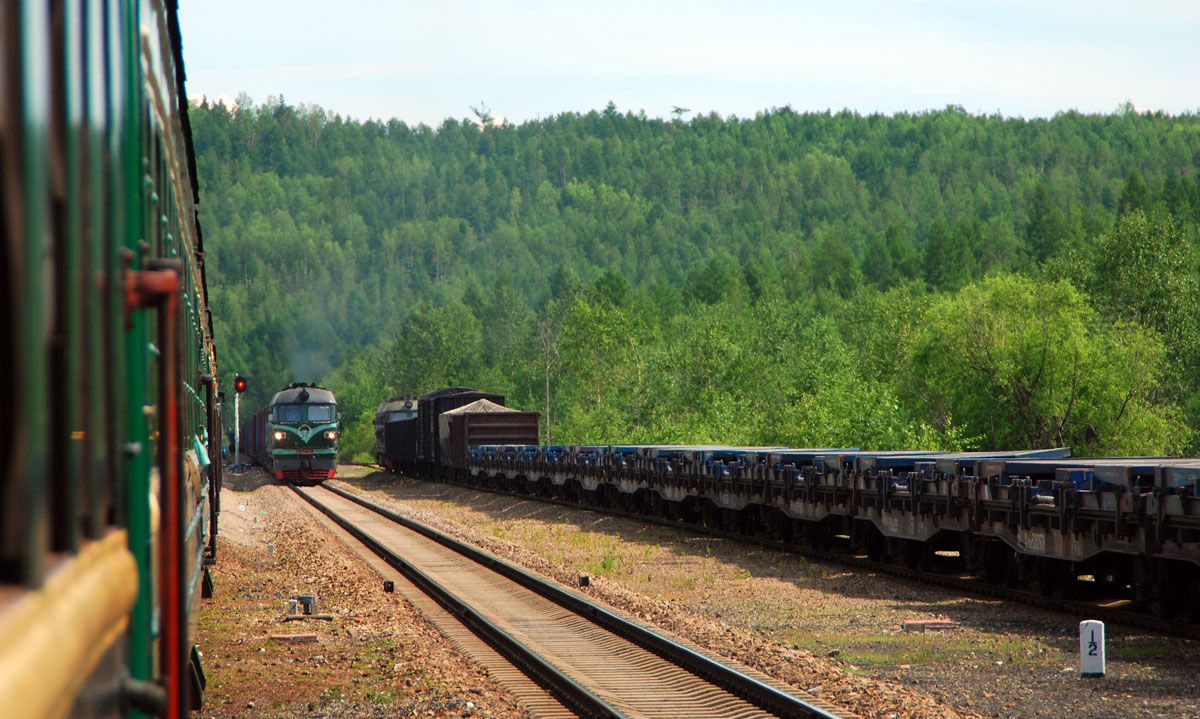 塔源站的会车